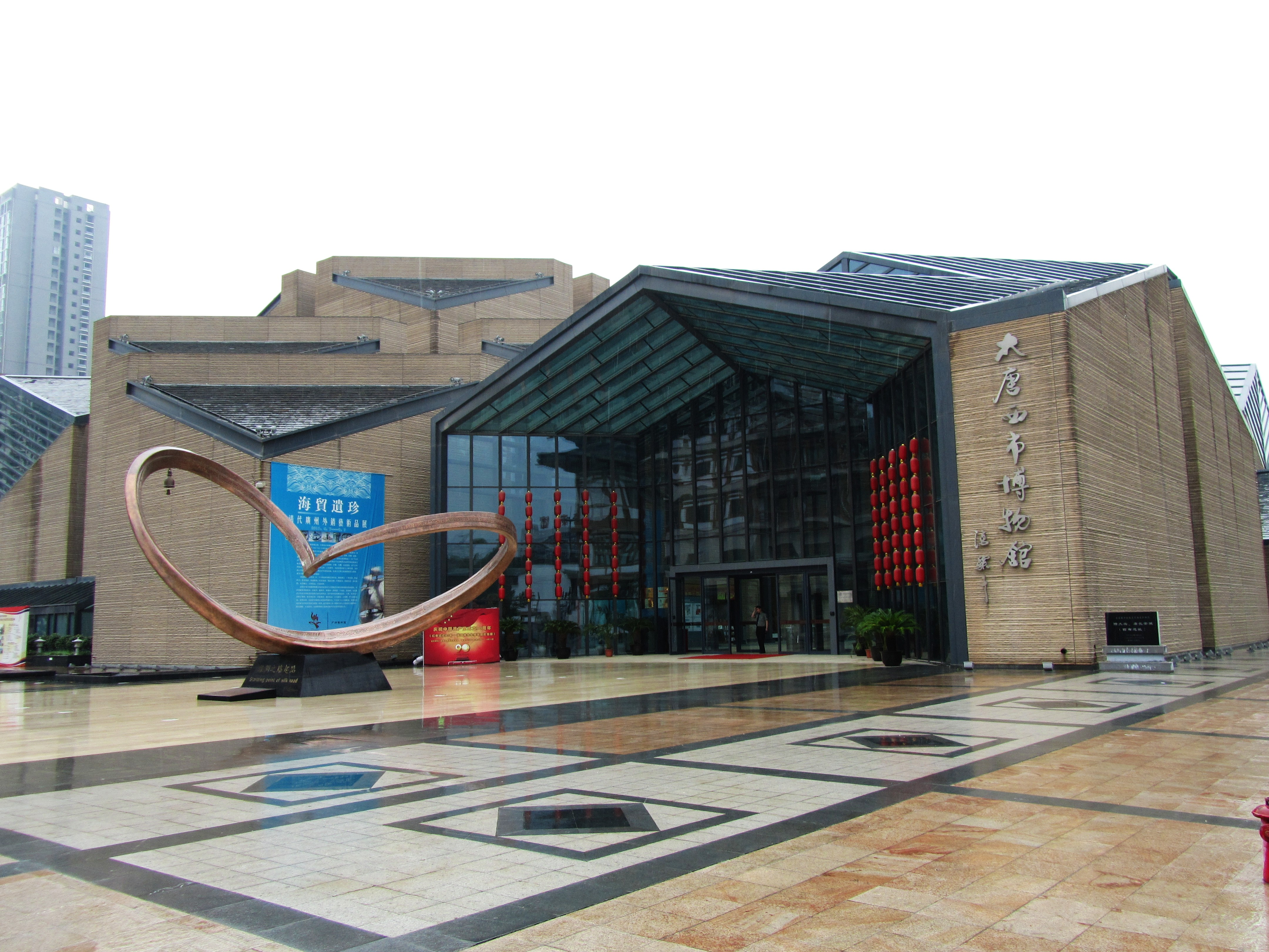 大唐西市博物馆，东南侧入口。